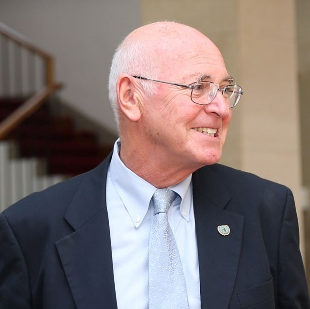 Ian Martin, UN-Diplomat